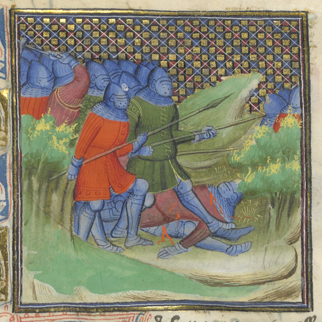 Bataille de Quimperlé (1342)